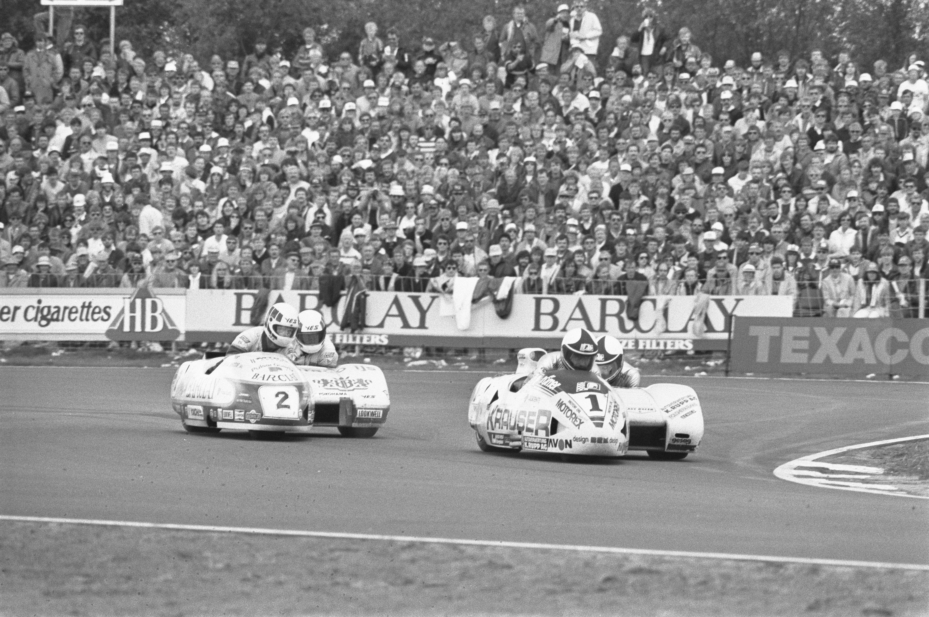 Collectie / Archief : Fotocollectie Anefo Reportage / Serie : TT Assen 1984 Beschrijving : TT van Assen, Zijspanrace. Links Egbert Streuer / Bernard Schnieders (nr. 2) en rechts Rolf Biland / Kurt Waltisperg Datum : 30 juni 1984 Locatie : Assen Trefwoorden : motorcoureurs, motorfietsen, motorraces, motorsport, sport Persoonsnaam : Biland, Rolf, Schnieder, Egbert, Streuer, Egbert, Waltisperg, Kurt Instellingsnaam : TT Fotograaf : Antonisse, Marcel / Anefo Auteursrechthebbende : Nationaal Archief Materiaalsoort : Negatief (zwart/wit) Nummer archiefinventaris : bekijk toegang 2.24.01.05 Bestanddeelnummer : 933-0187